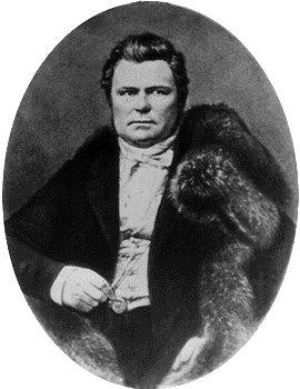 Immanuel Nobel (Gävle, 24 maart 1801 - Heleneborg, 3 september 1872) was een Zweedse ingenieur, architect, uitvinder en industrieel. Vader van Alfred Nobel